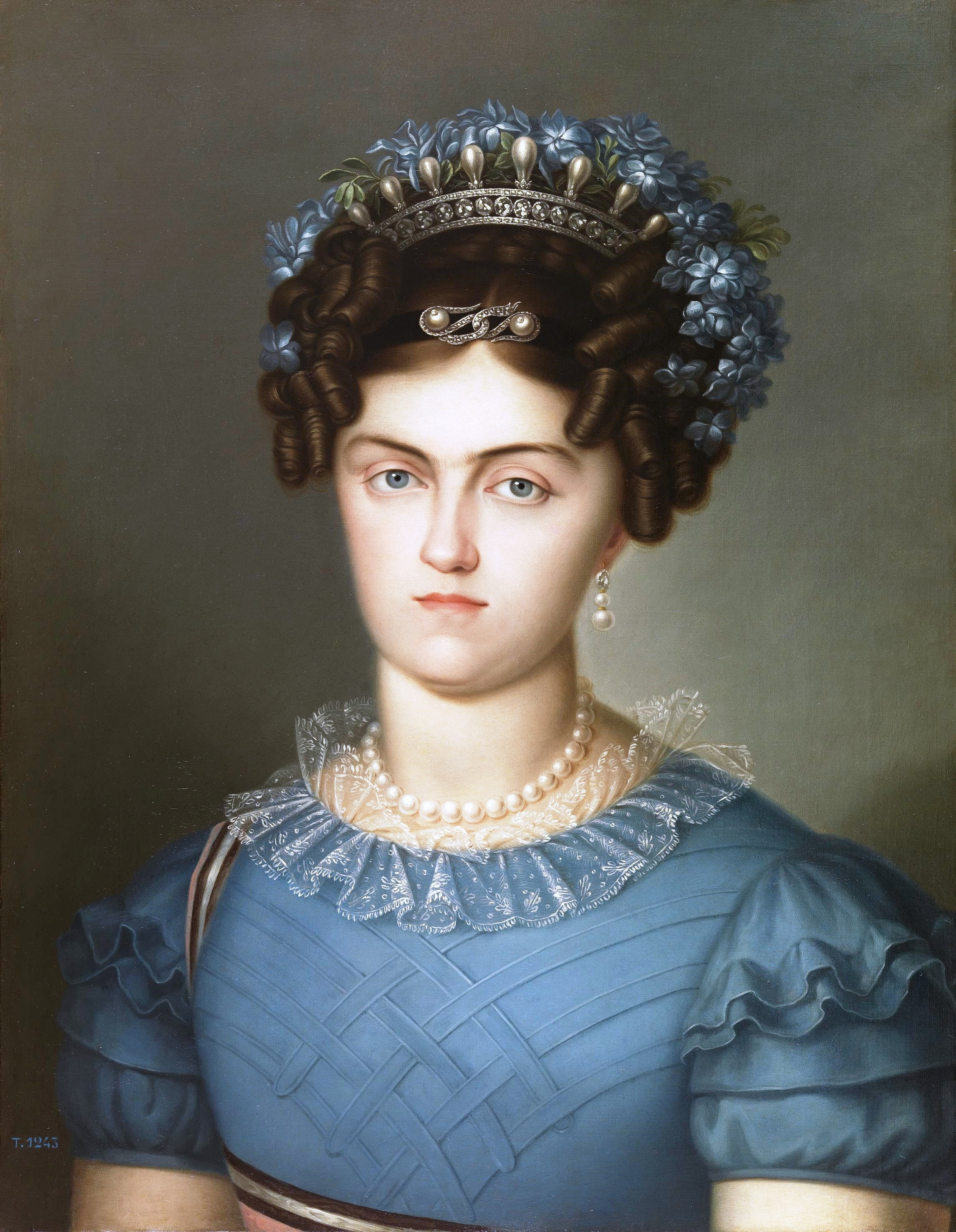 Retrato de la reina María Josefa Amalia de Sajonia (1803-1829), que fue reina consorte de España por su matrimonio con el rey Fernando VII de España, de quien fue la tercera esposa.